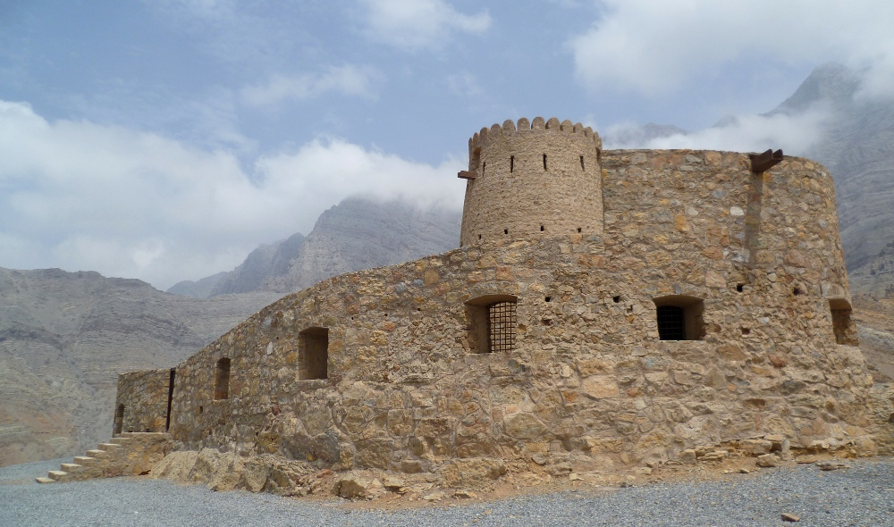 Musandam Peninsula, Oman.